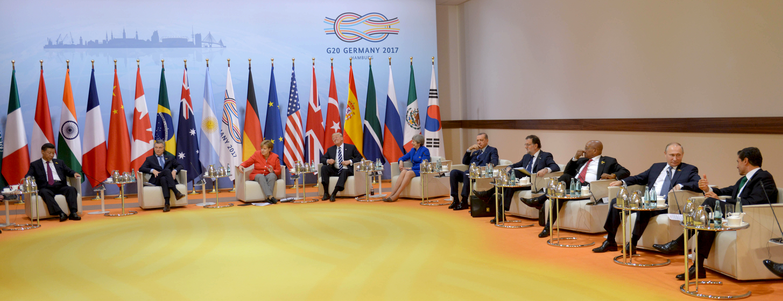 Cumbre de Líderes del G20